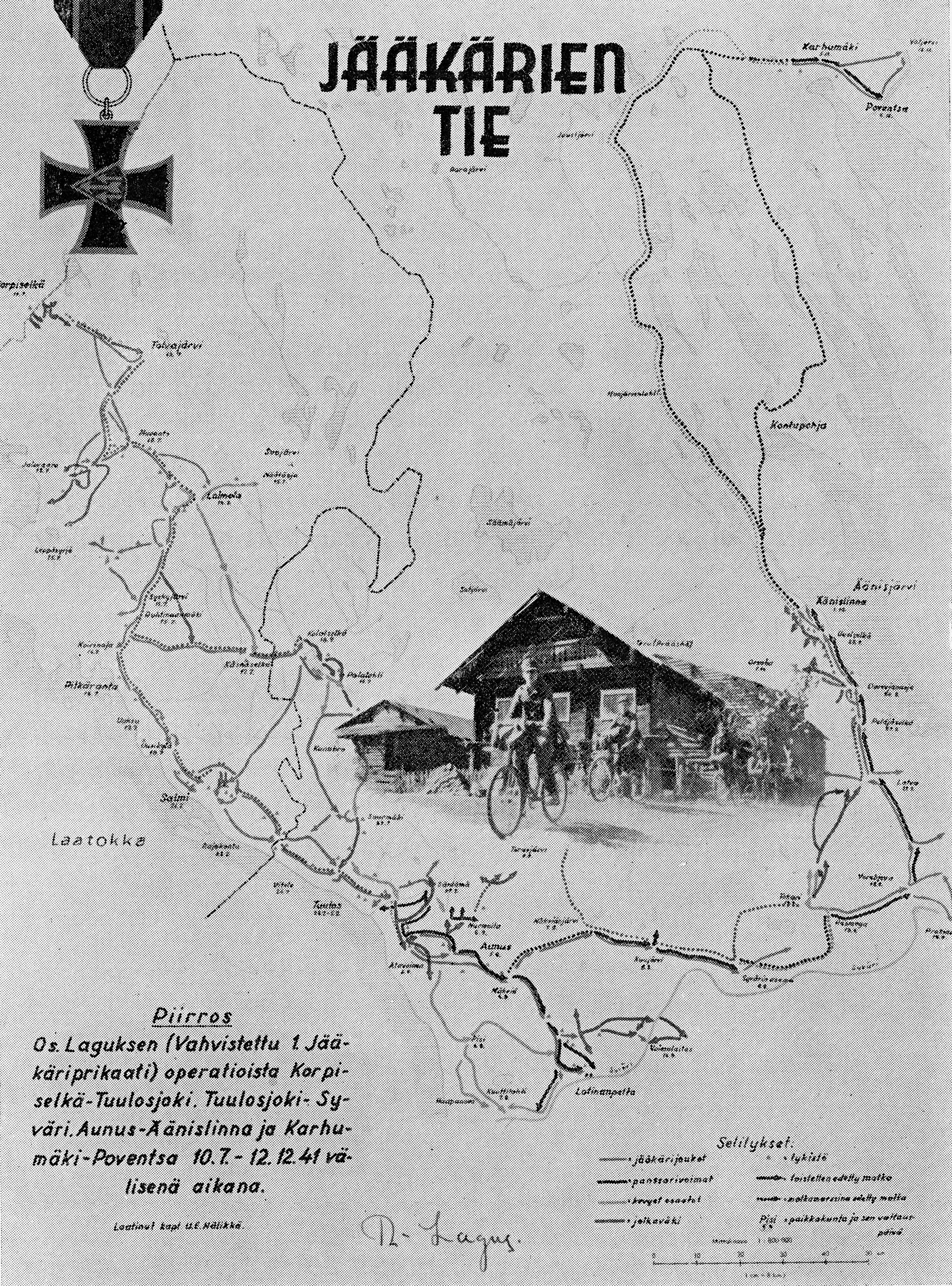 Jääkärien tie -kartta(Seppälä 1966, 167).